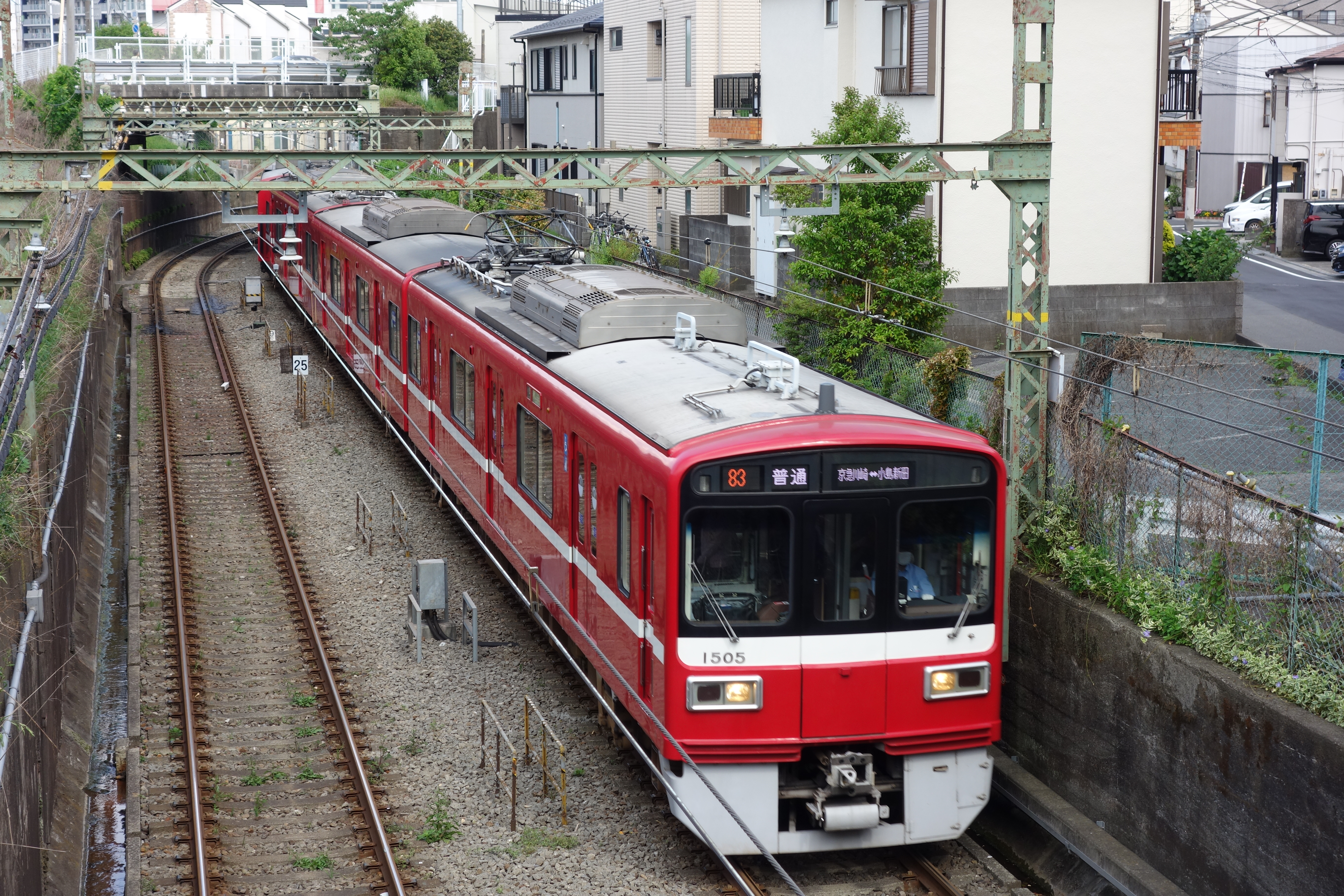 京急大師線港町‐京急川崎間で撮影した1500形です。